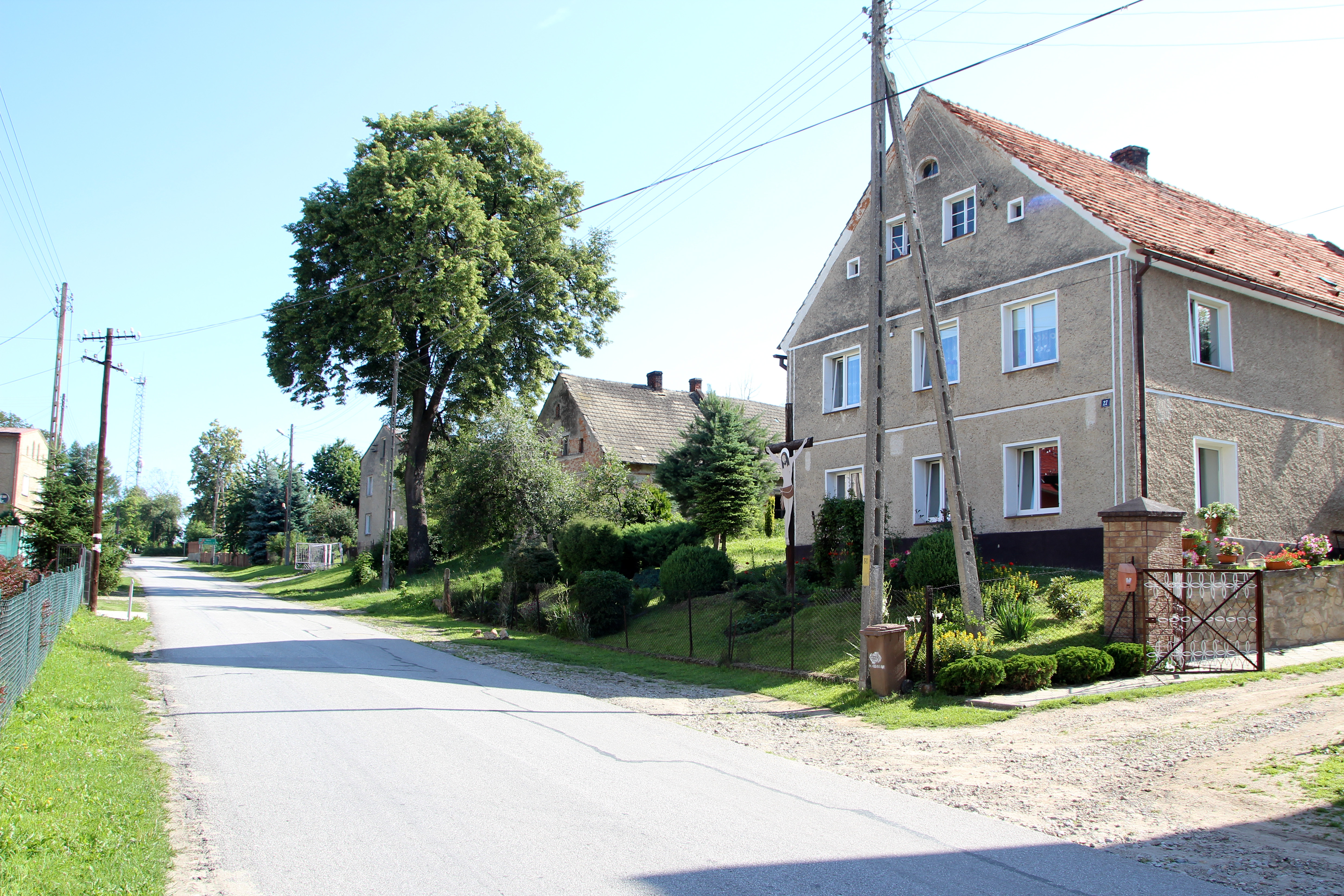 Wierzbięcice - wieś w Polsce w opolskim, w powiecie nyskim, w gminie Nysa.